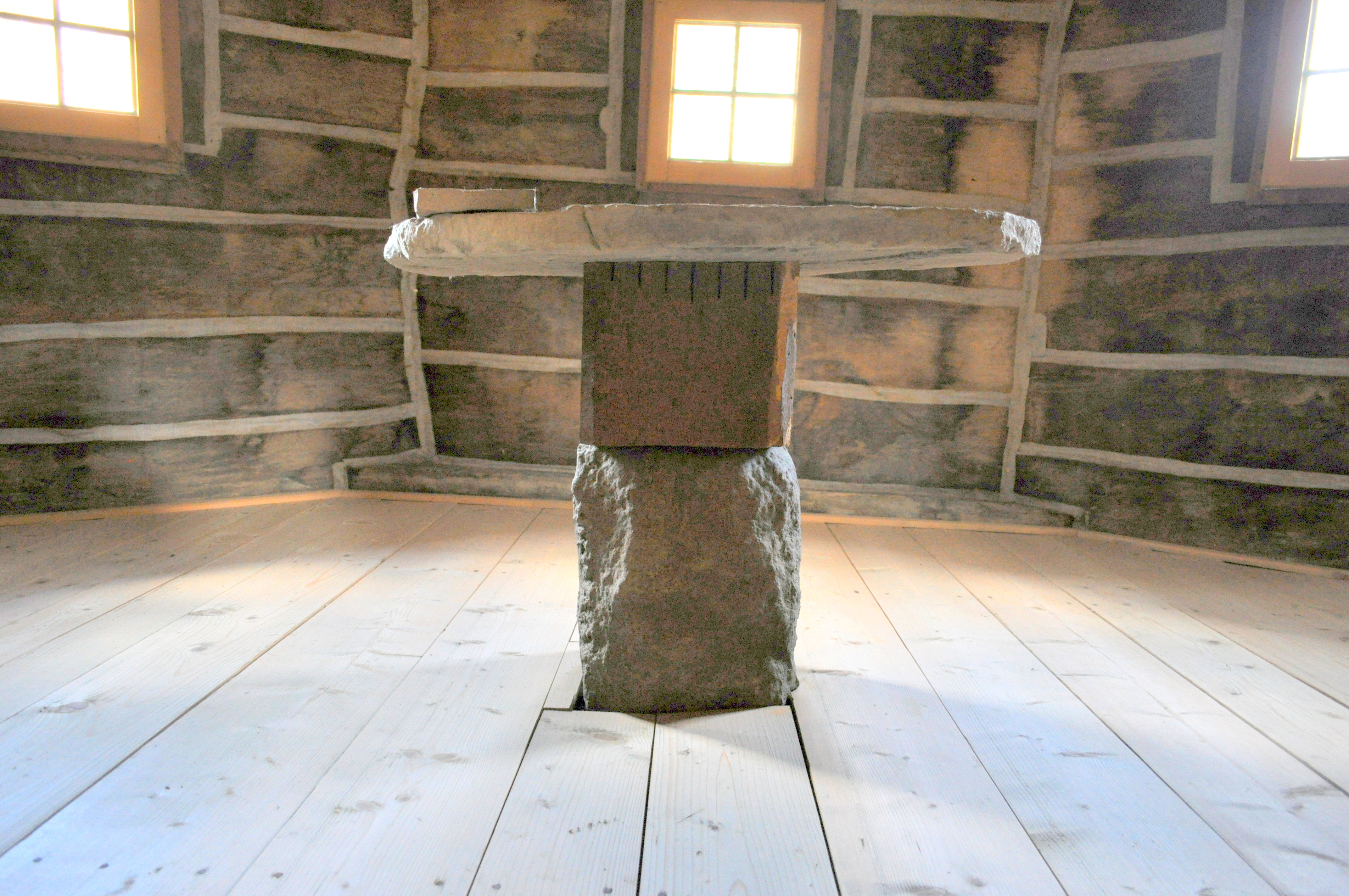 Biserica de lemn "Întâmpinarea Domnului", sat GROŞII NOI; comuna BÂRZAVA